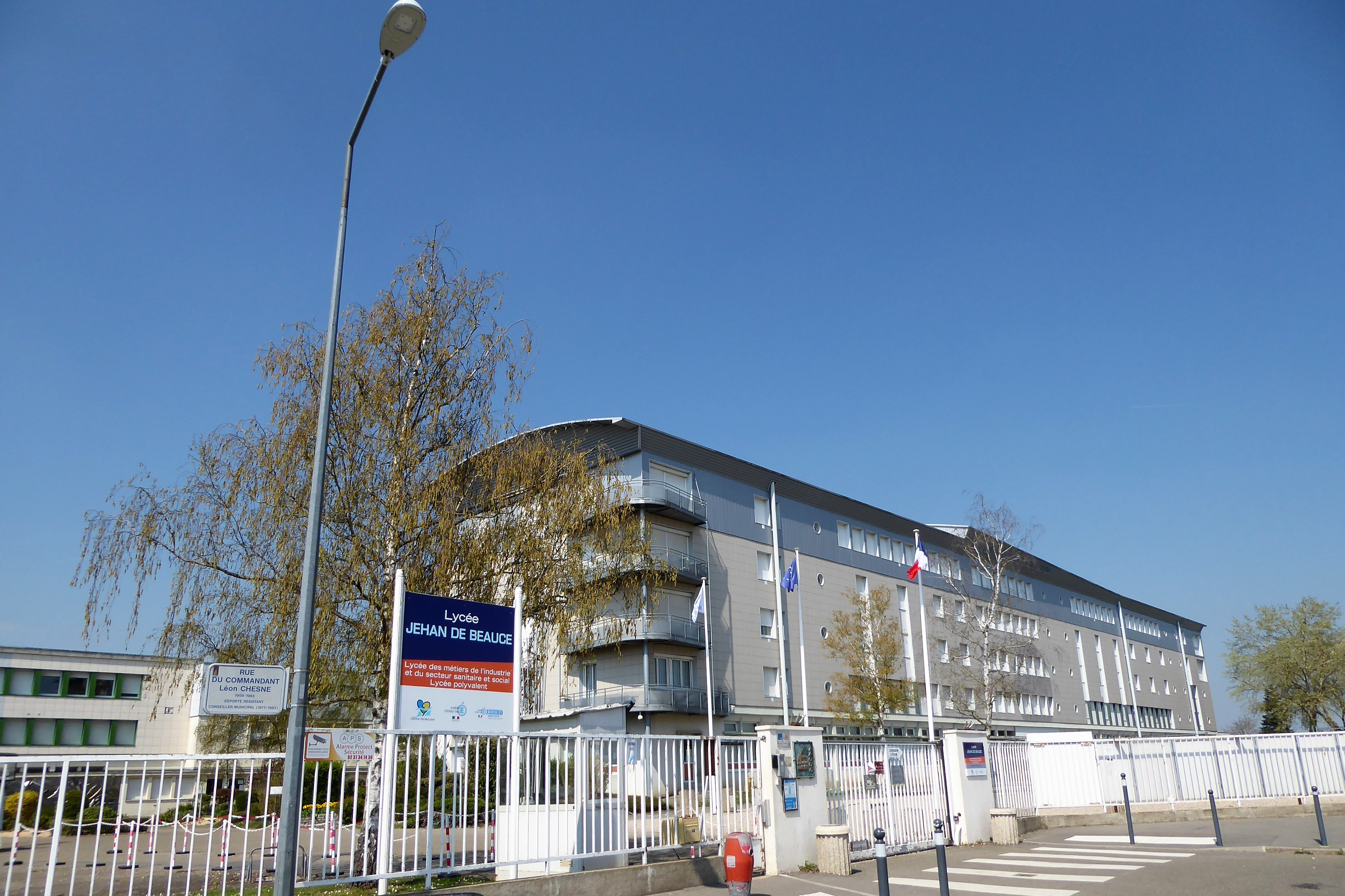 lycée Jehan de Beauce, quartier de Rechèvres, Chartres, Eure-et-Loir, France.